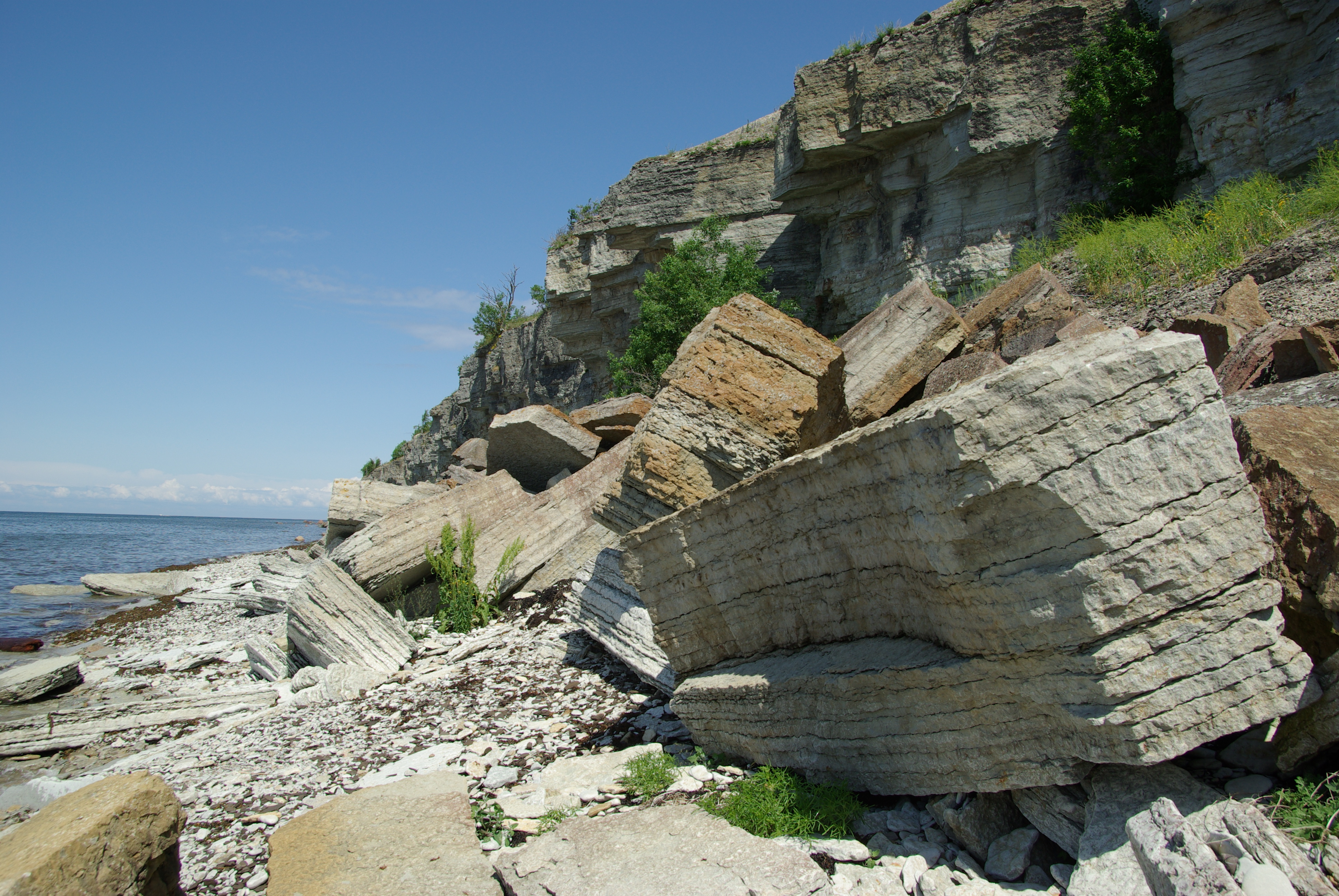 Uuga pank algab Paldiski linnast Muula mägedest ja läheb sujuvalt üle Pakri pangaks